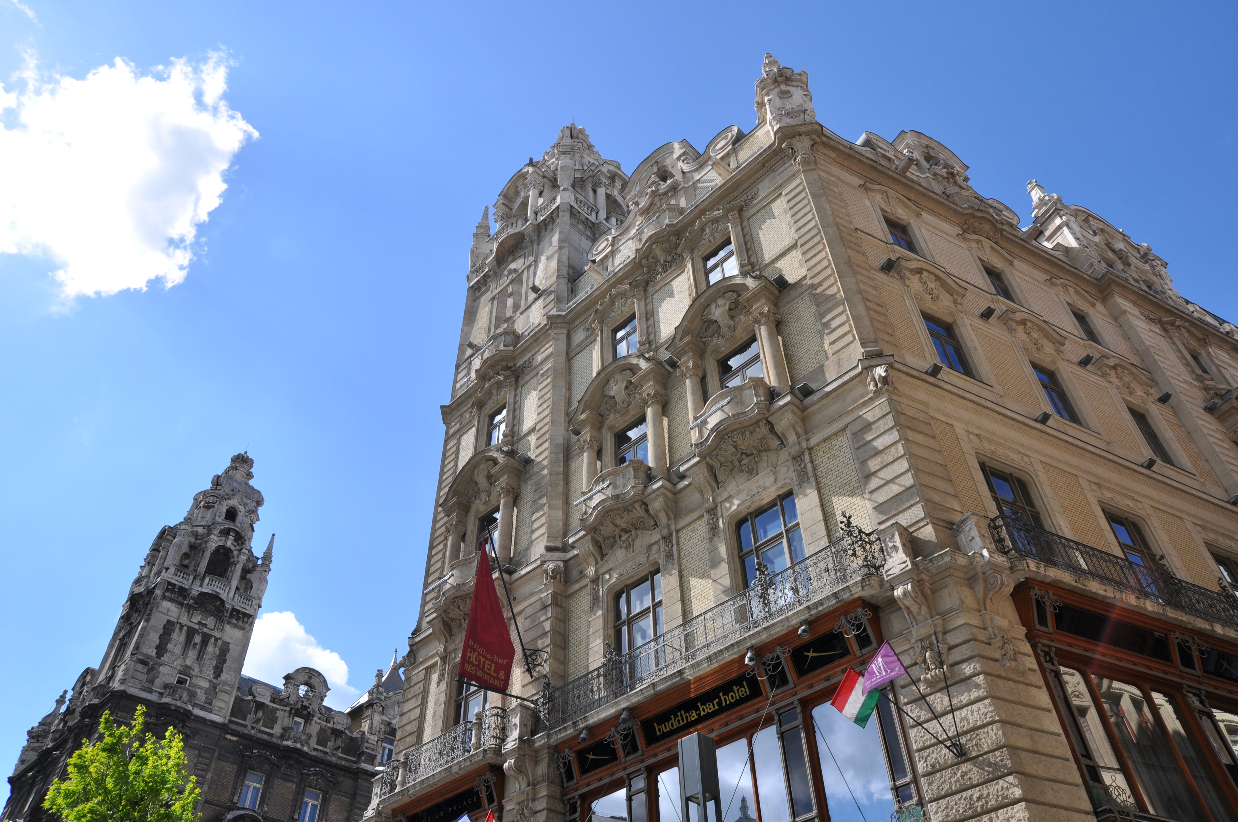 Budapest, Klotild paloták